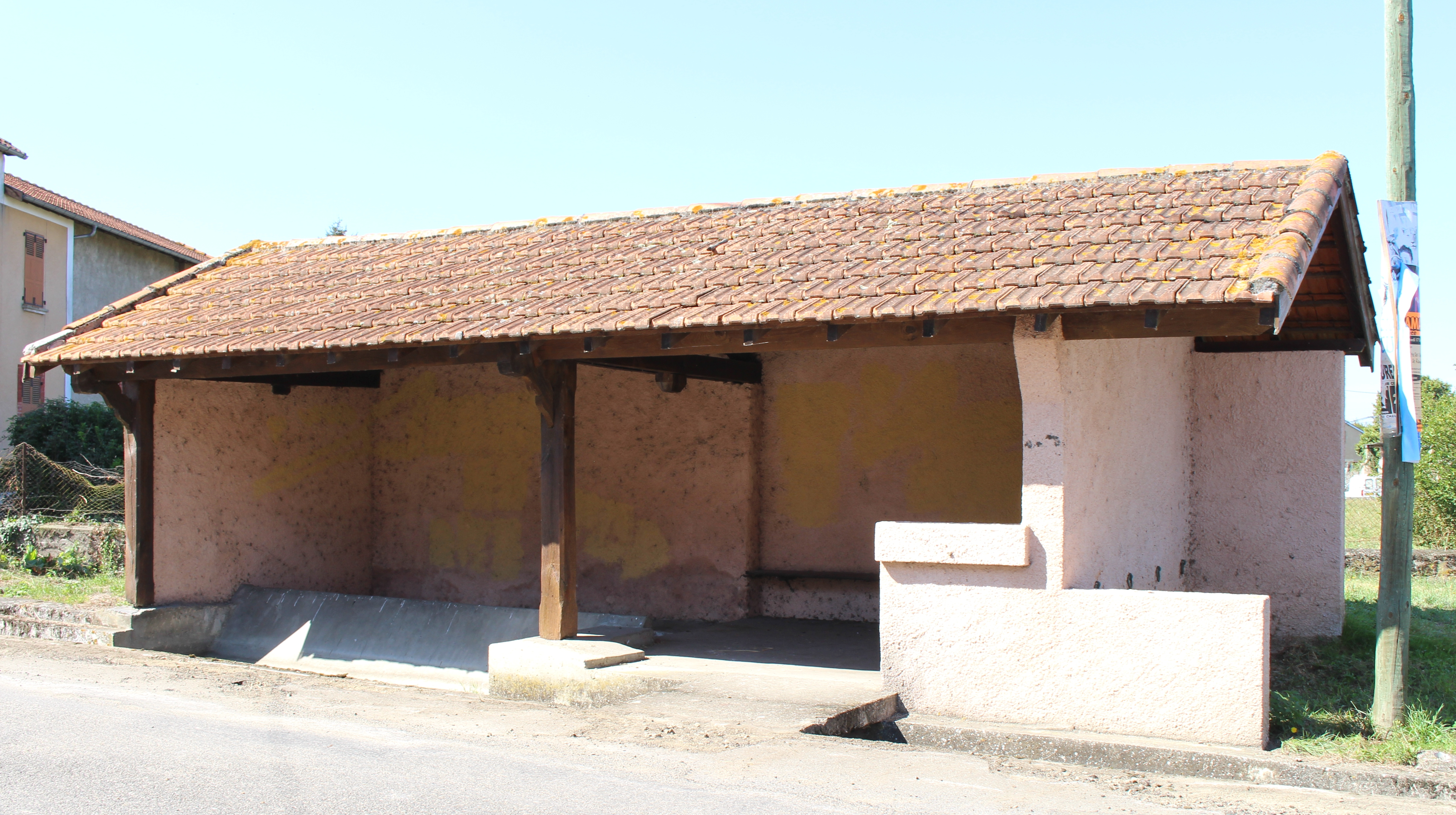 Lavoir de Bazillac (Hautes-Pyrénées)